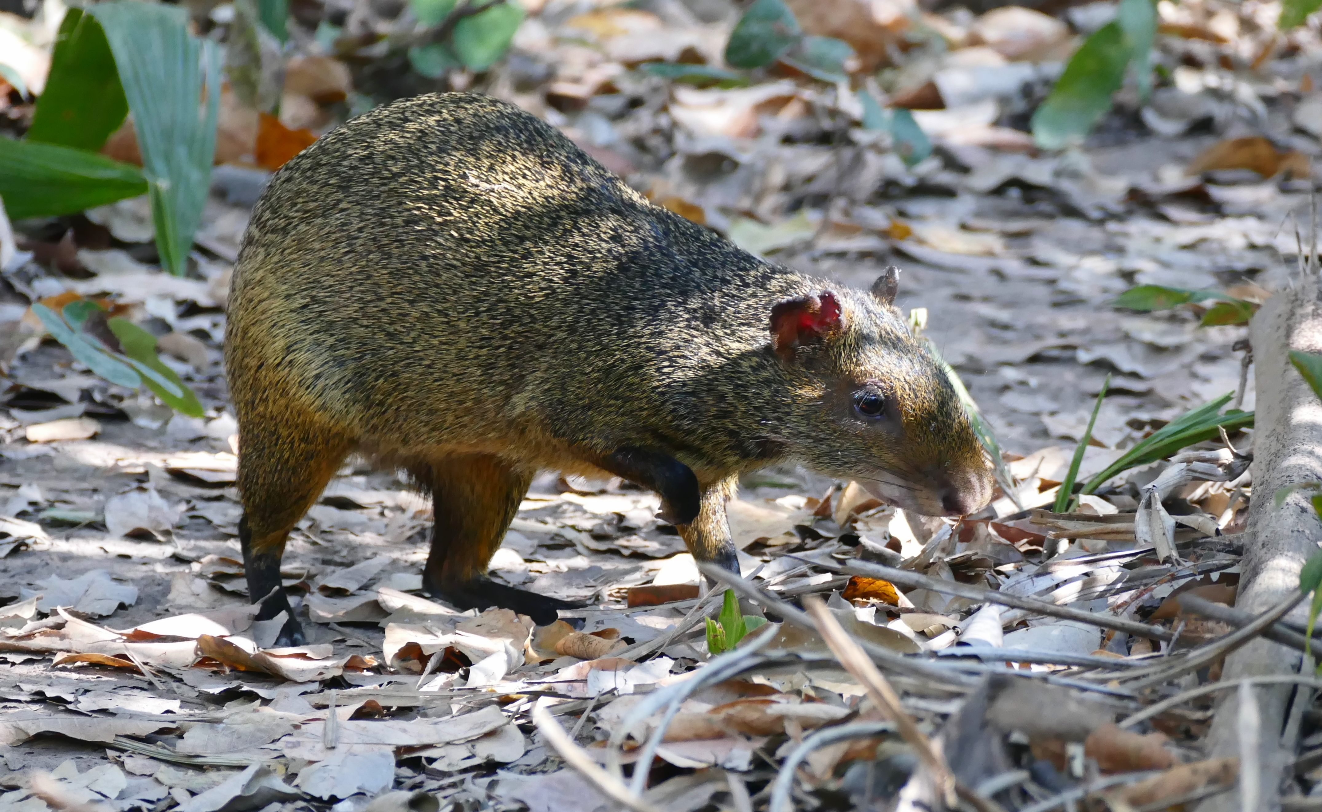 Pousada Rio Claro, Transpantaneira, Poconé, Mato Grosso, BRAZIL